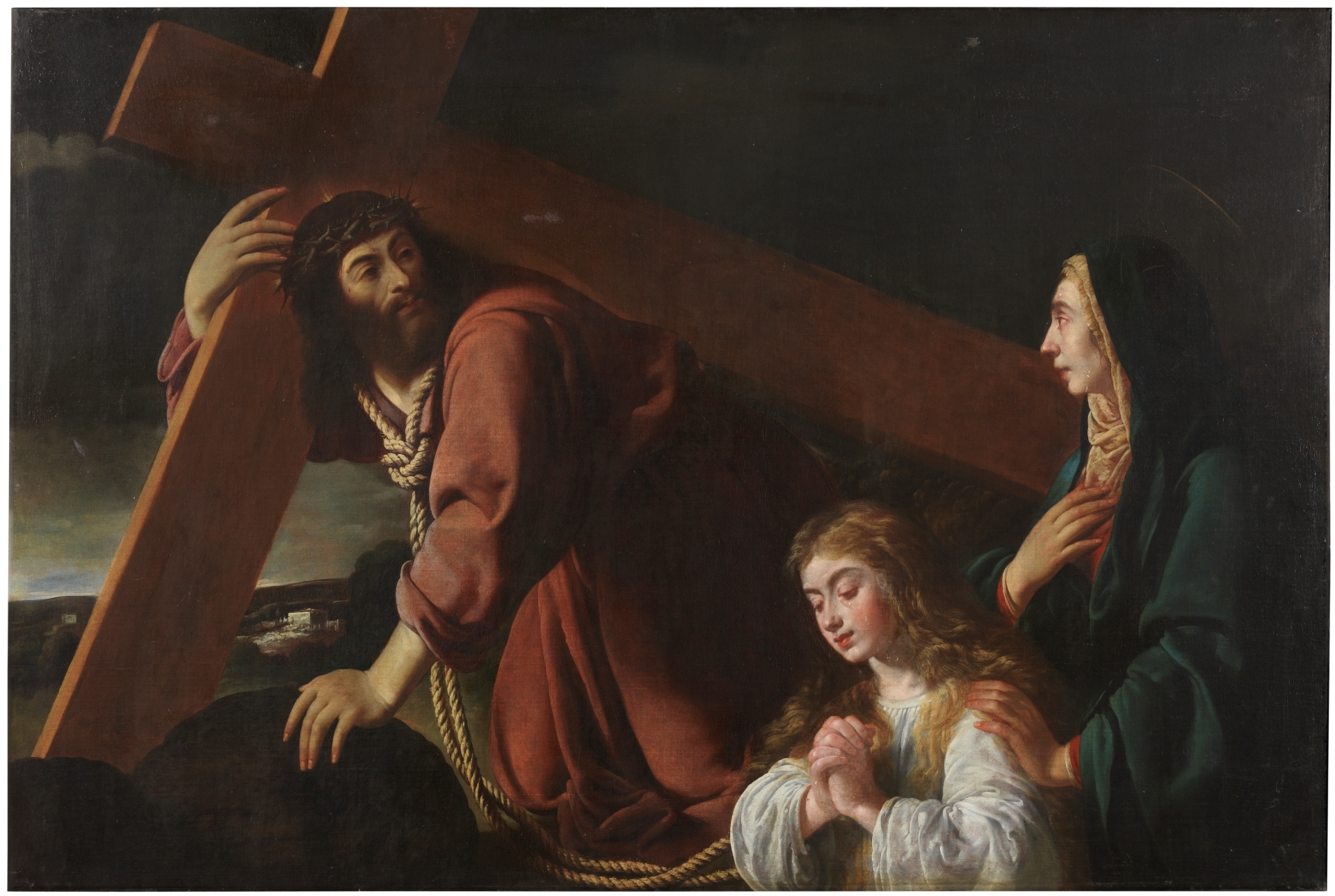 La obra representa a Jesucristo cargando con la cruz y siendo contemplado por su madre, la Virgen María.